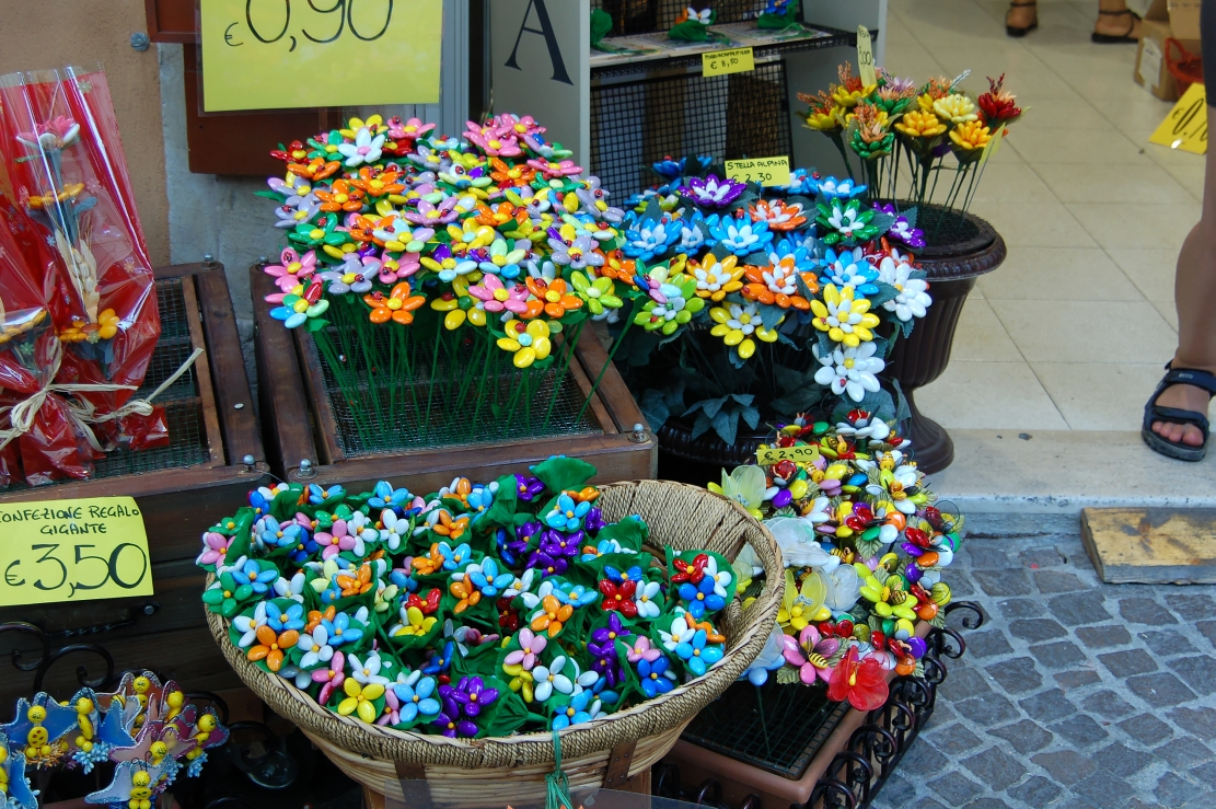 Sulmona 2011